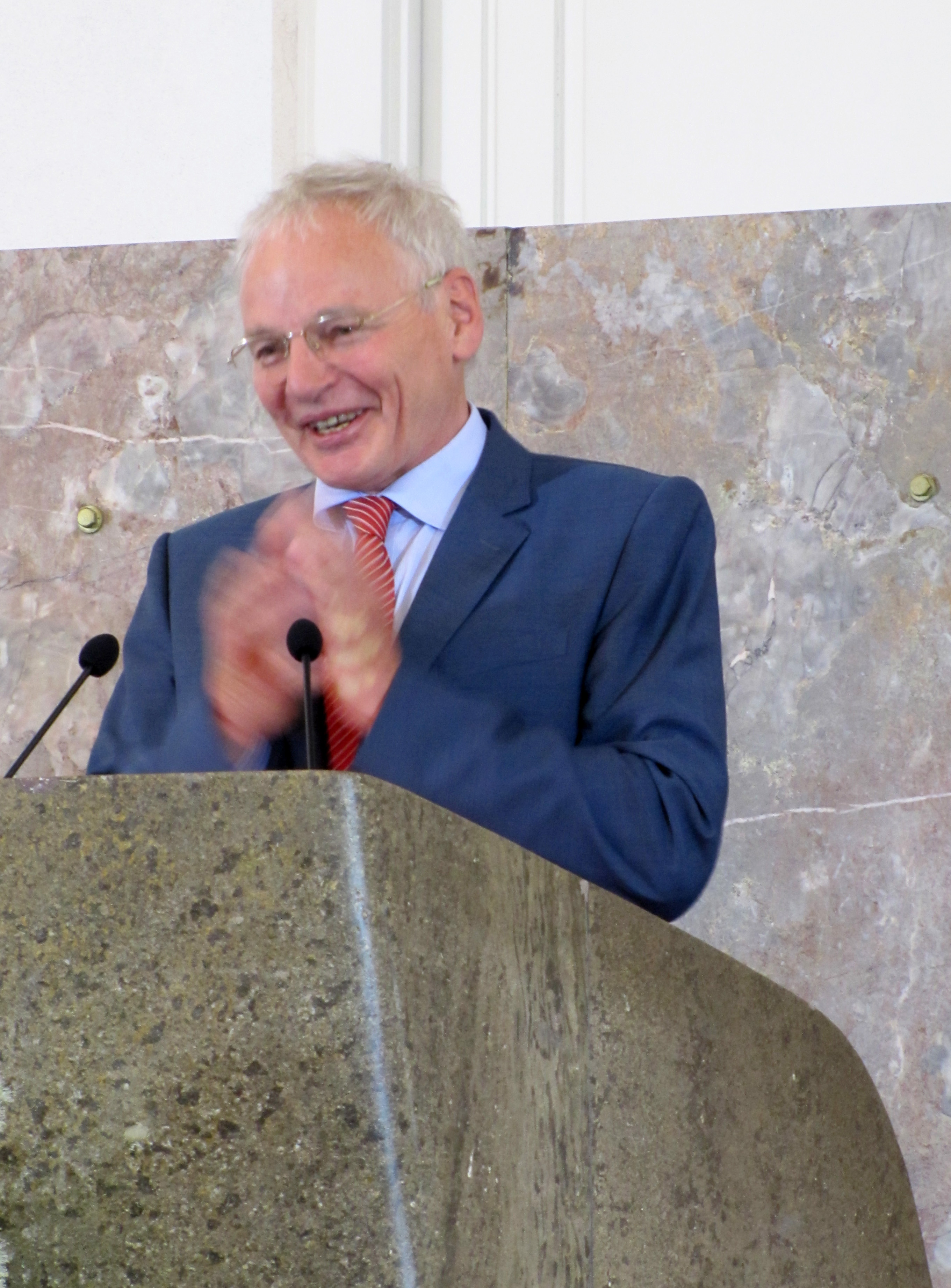 Goetz Aly (Preistraeger), 2012 in der Frankfurter Paulskirche zur Verleihung des Ludwig-Boerne-Preises.